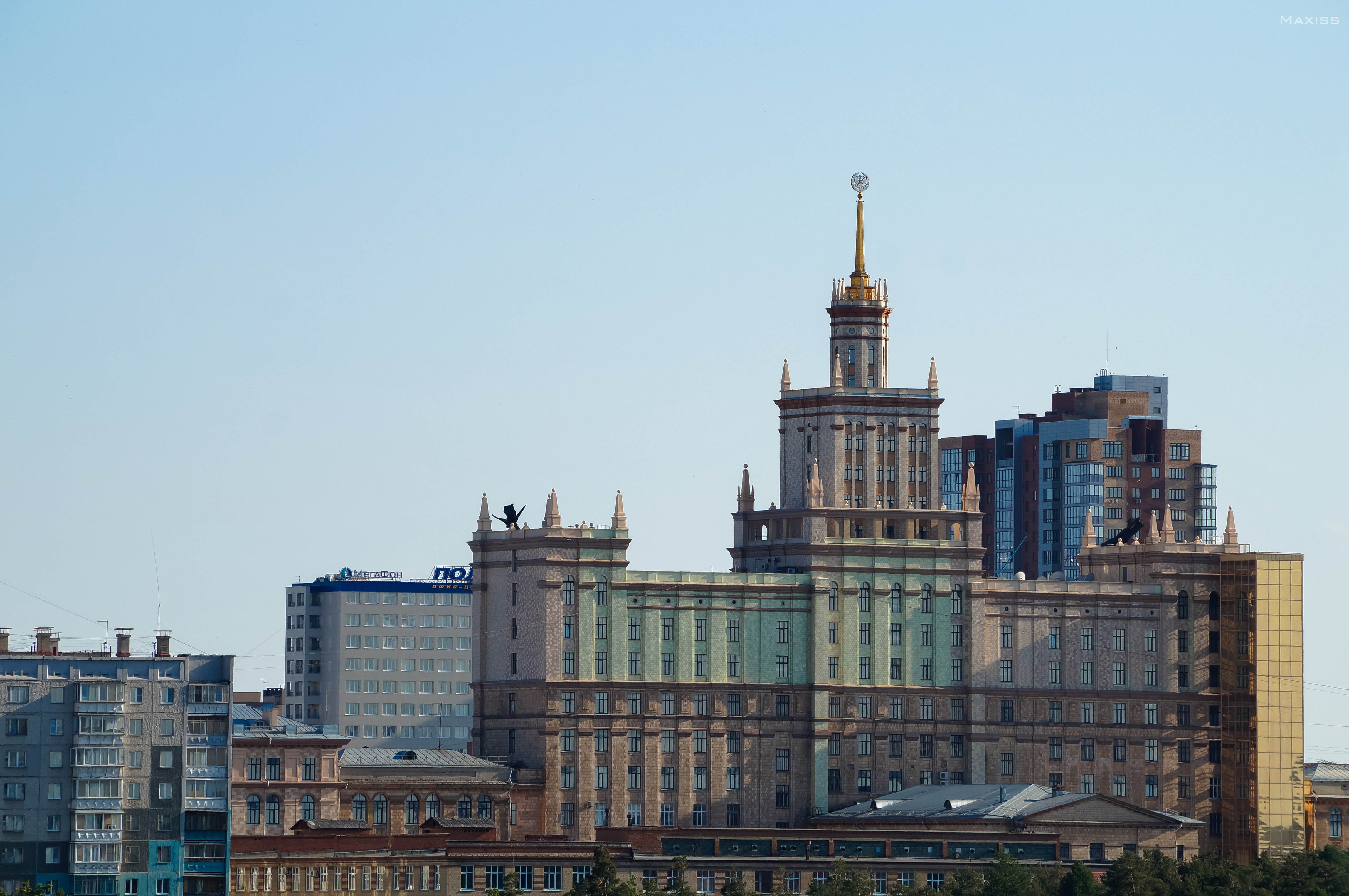 Вид сзади